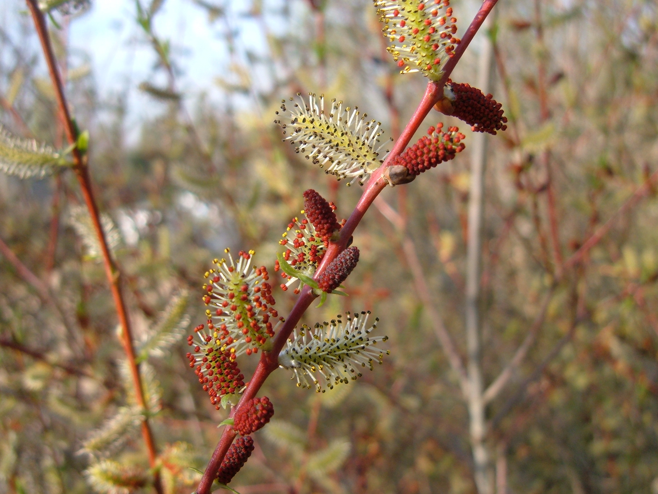 Inflorecencia masculina de Salix purpurea. Procedencia: cultivada en el Jardín Botánico de Alcalá de Henares